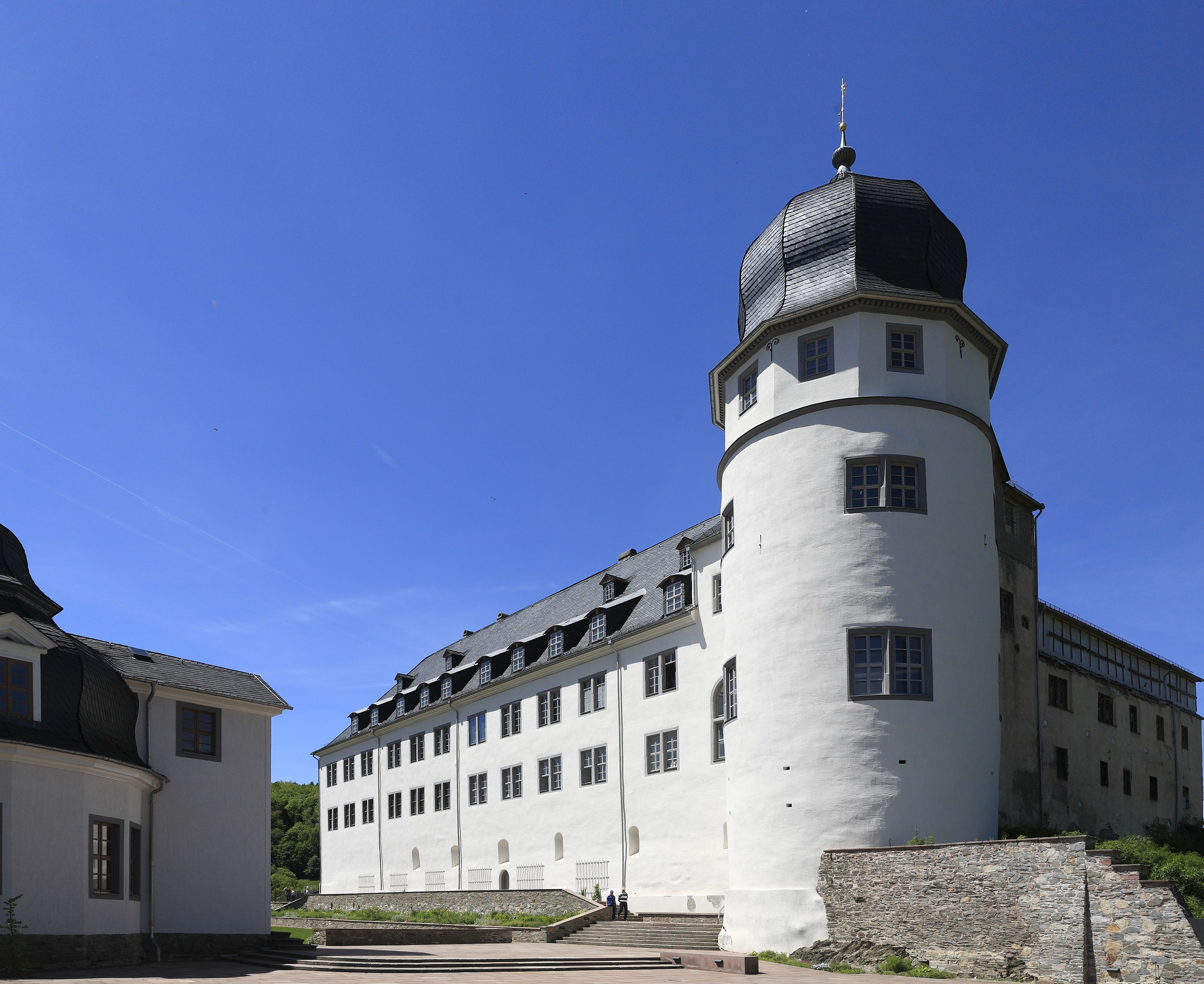 Vom Wasserbecken, das als Löschwasserbehälter vorgesehen, aber praktisch wohl als Schwimmbad 1937–939 gebaut wurde. Links angeschnitten der Gartenpavillon.